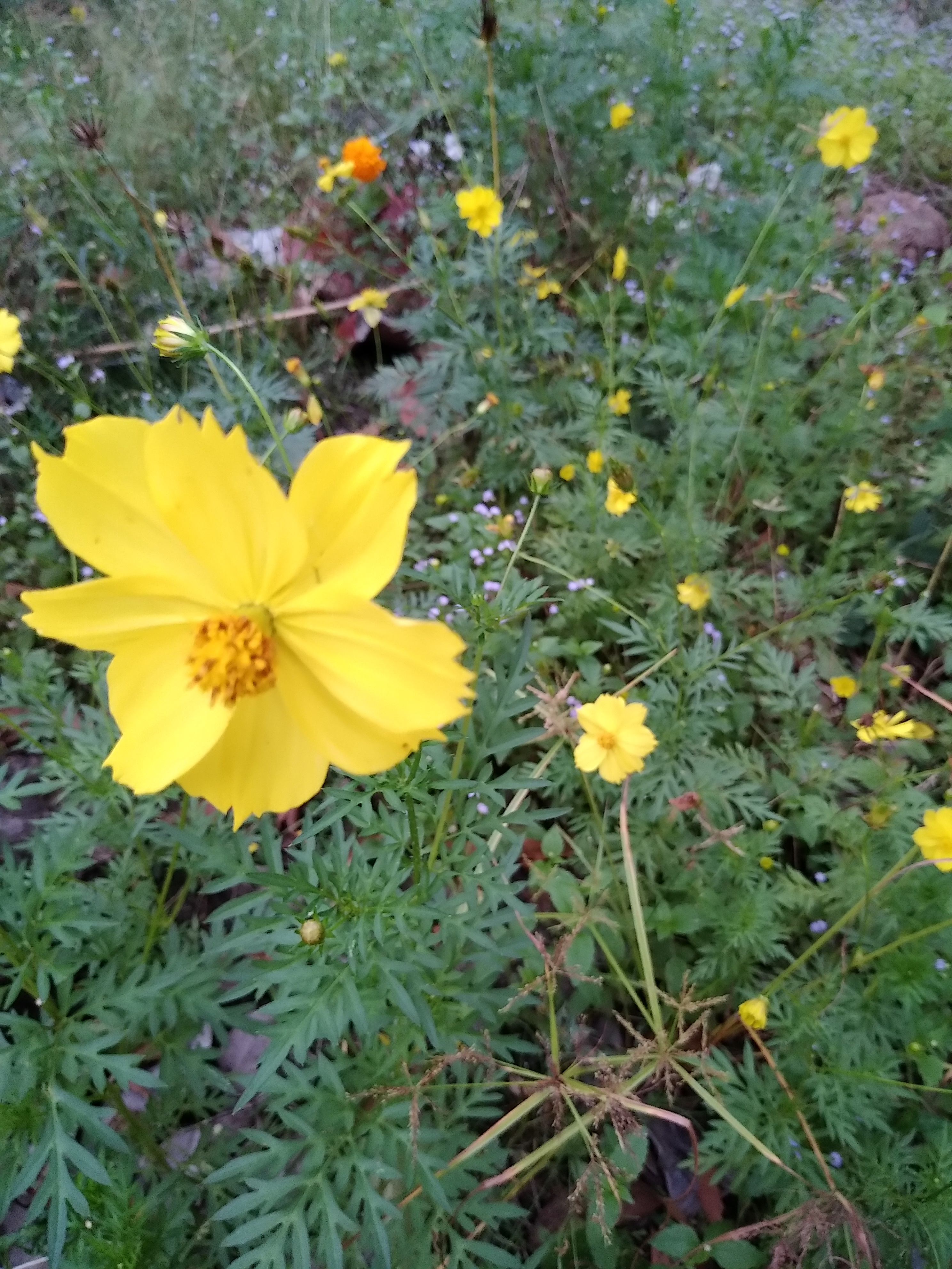 Rau Nhái, một loại hoa có nguồn gốc từ Châu Âu, mọc rất nhiều ở Việt Nam và Indonesia.